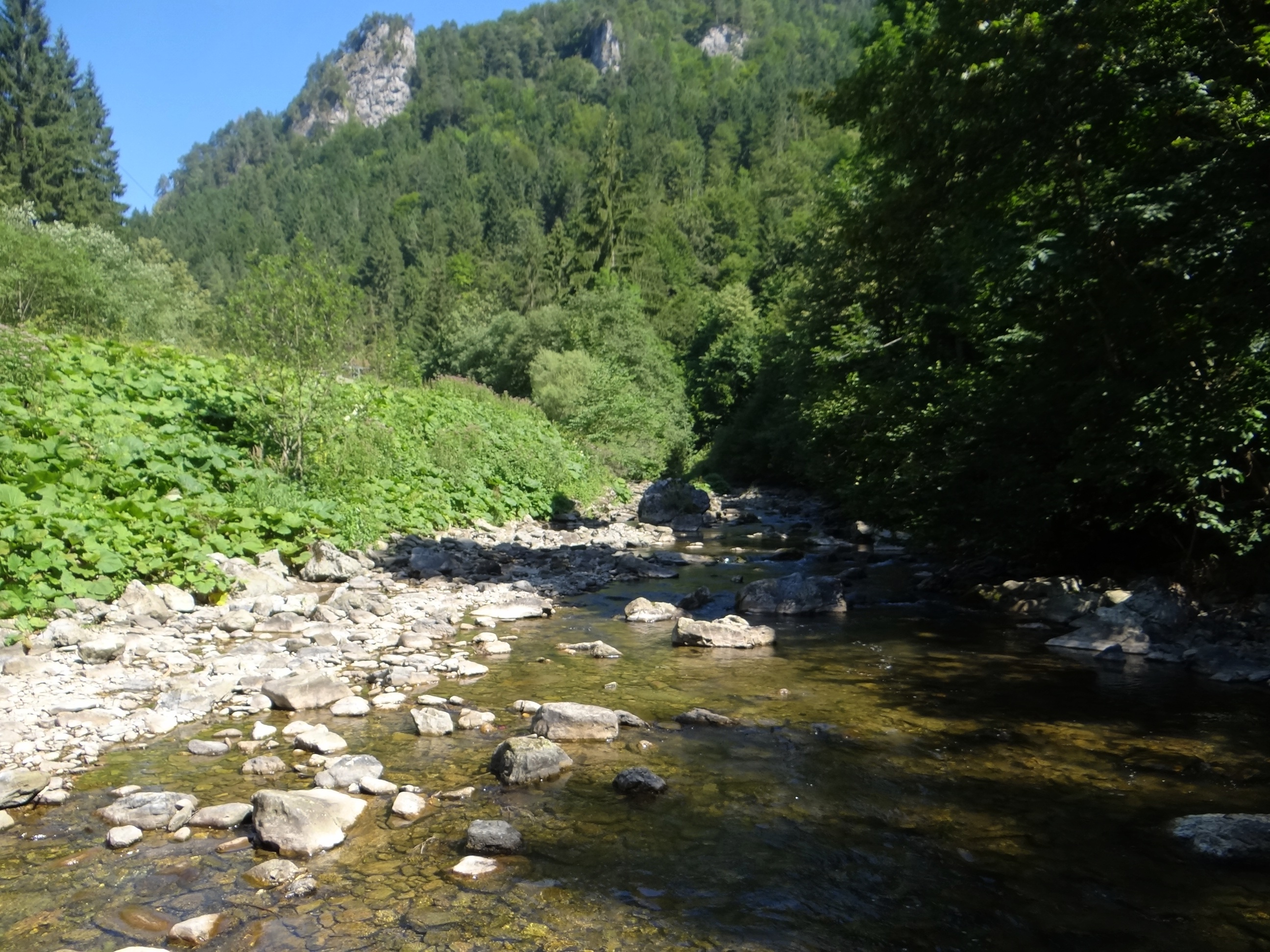 Zázrivka